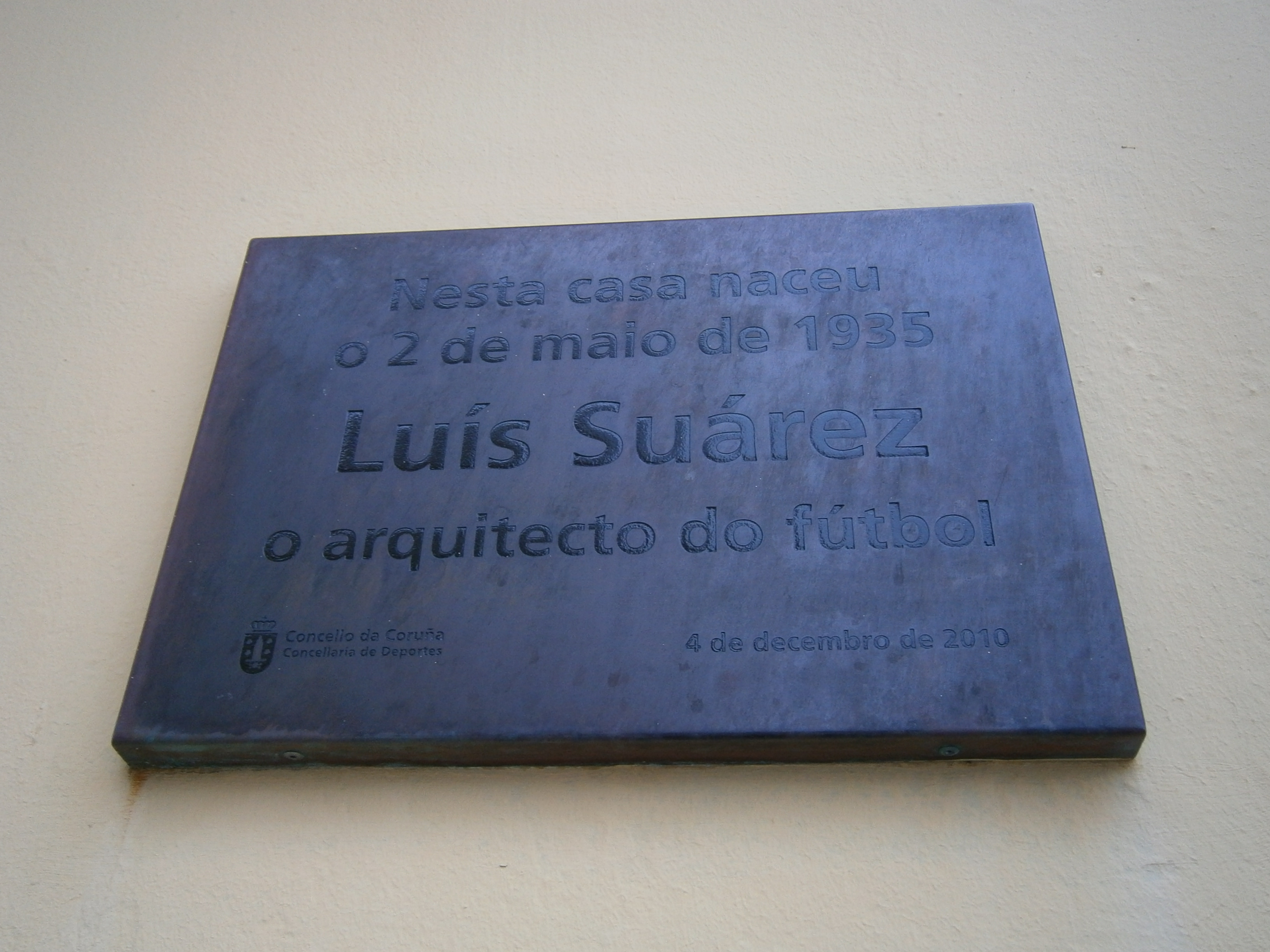 Placa na casa natal de Luis Suárez Miramontes